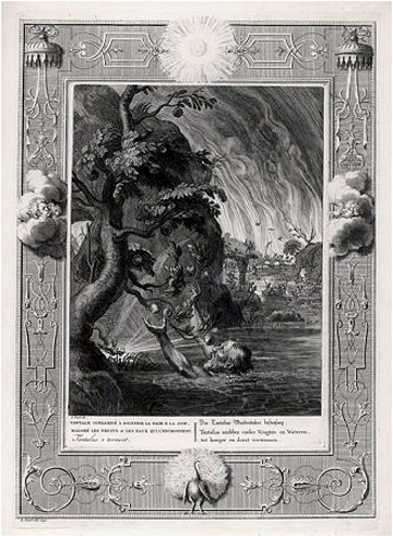 Тантал